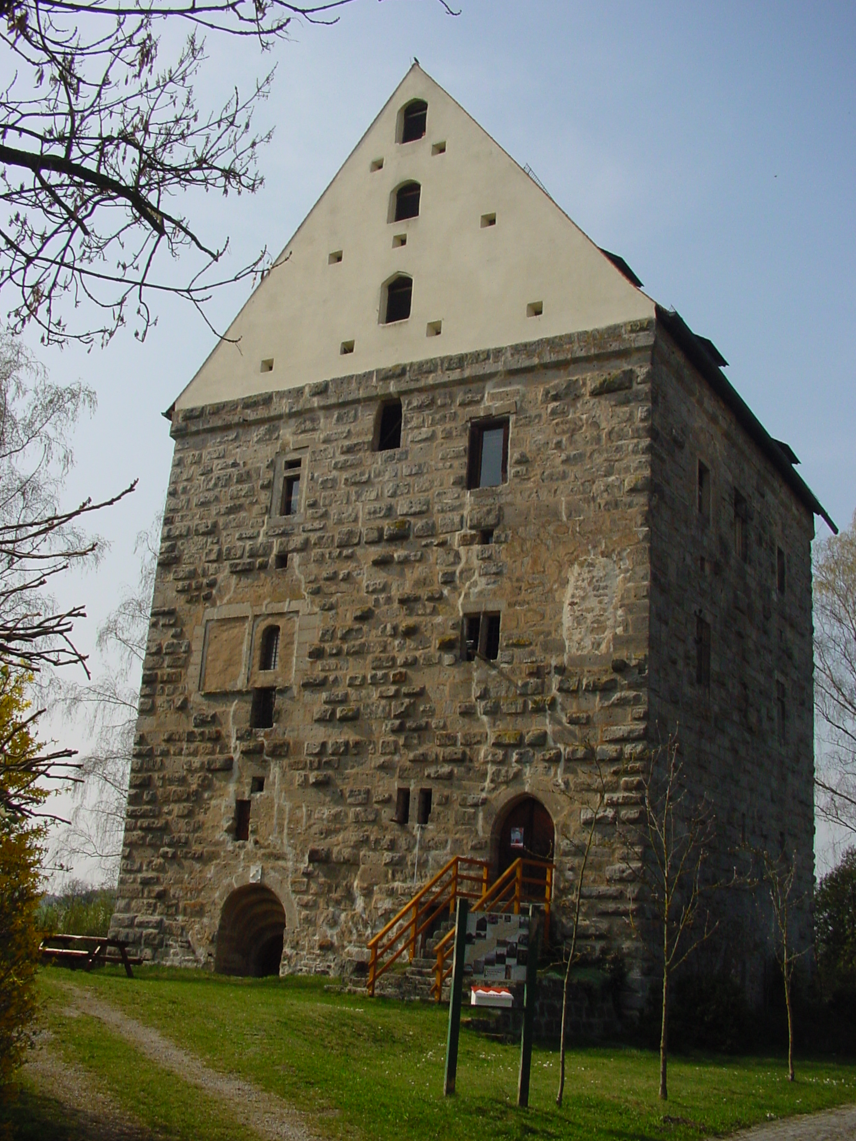 Wohnturm von Osten